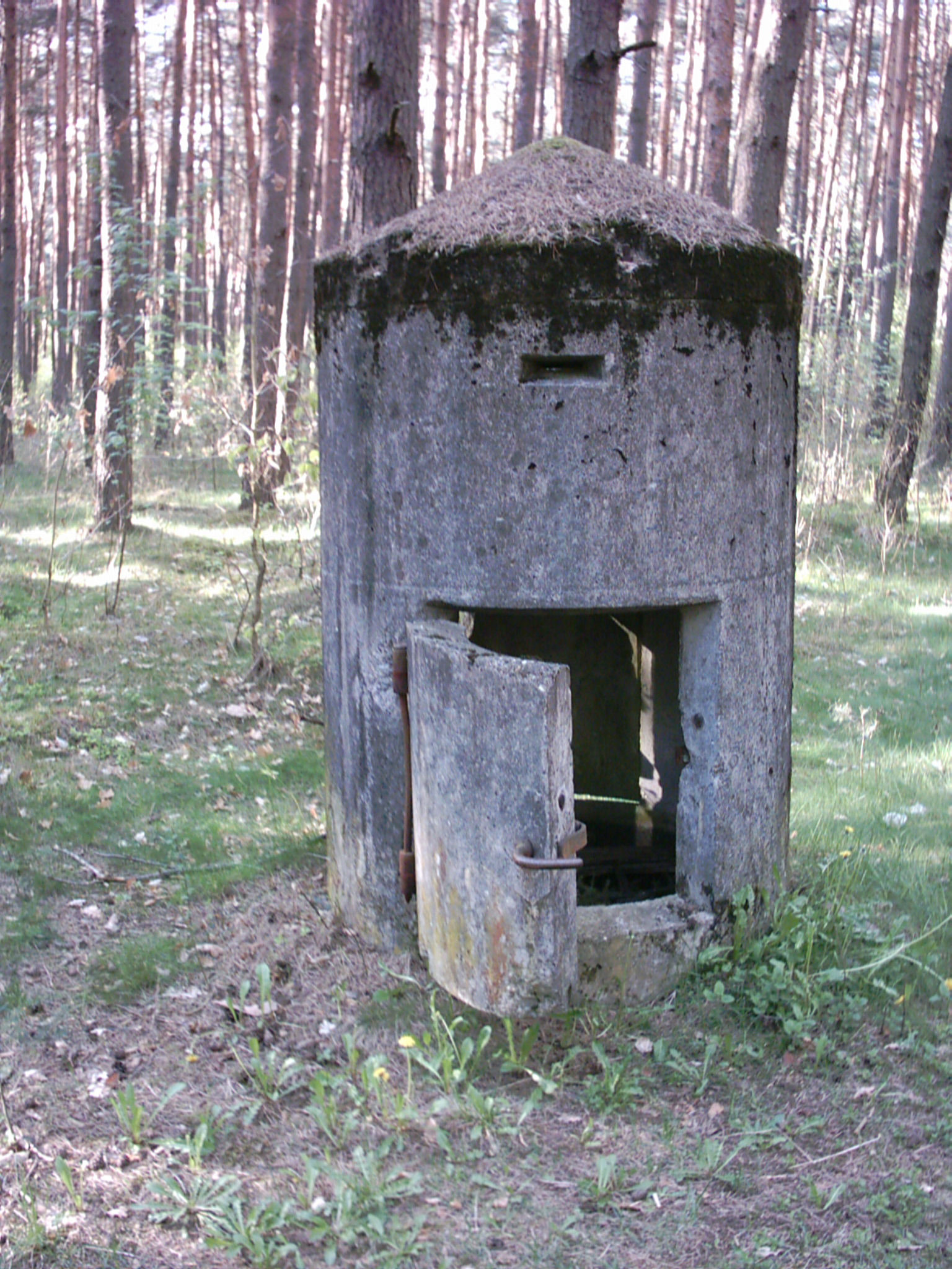 Einmannbunker für das Wachpersonal des Lagers Rollwald Quelle: selbst fotografiert Fotograf/Zeichner: presse03 Datum: 2. Mai 2006